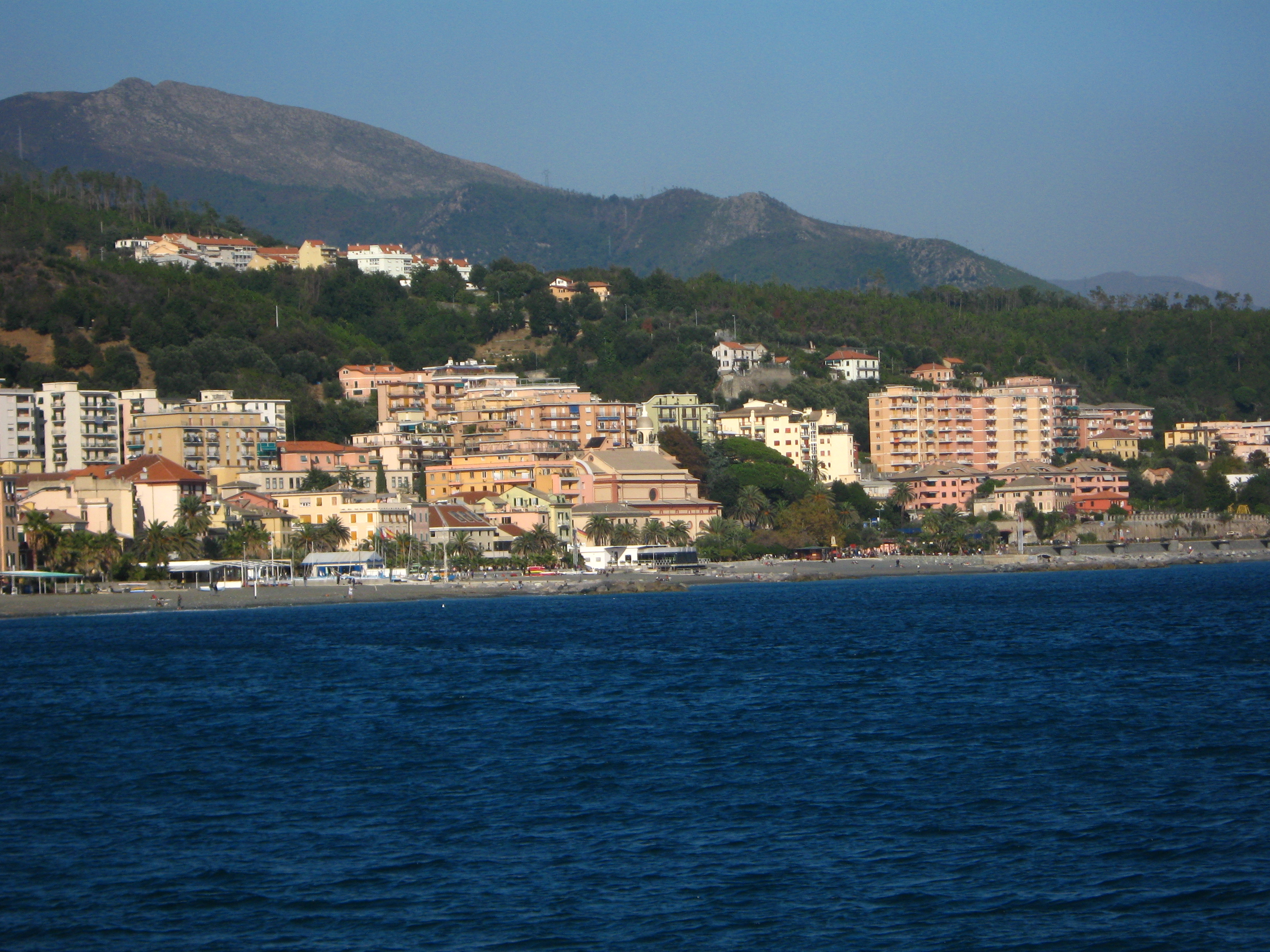 Cogoleto vista dal mare.